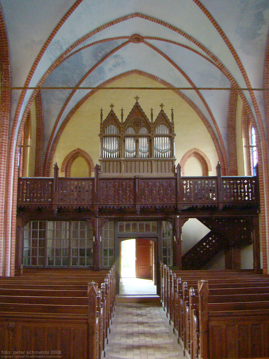 Dorfkirche in Minzow, Leizen, Lkr. Müritz